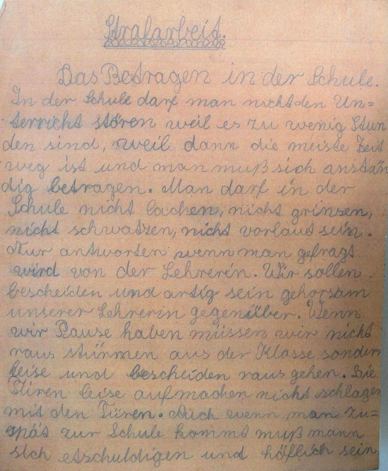 Sammlung Kindheit und Jugend (Stiftung Stadtmuseum Berlin) Strafarbeit